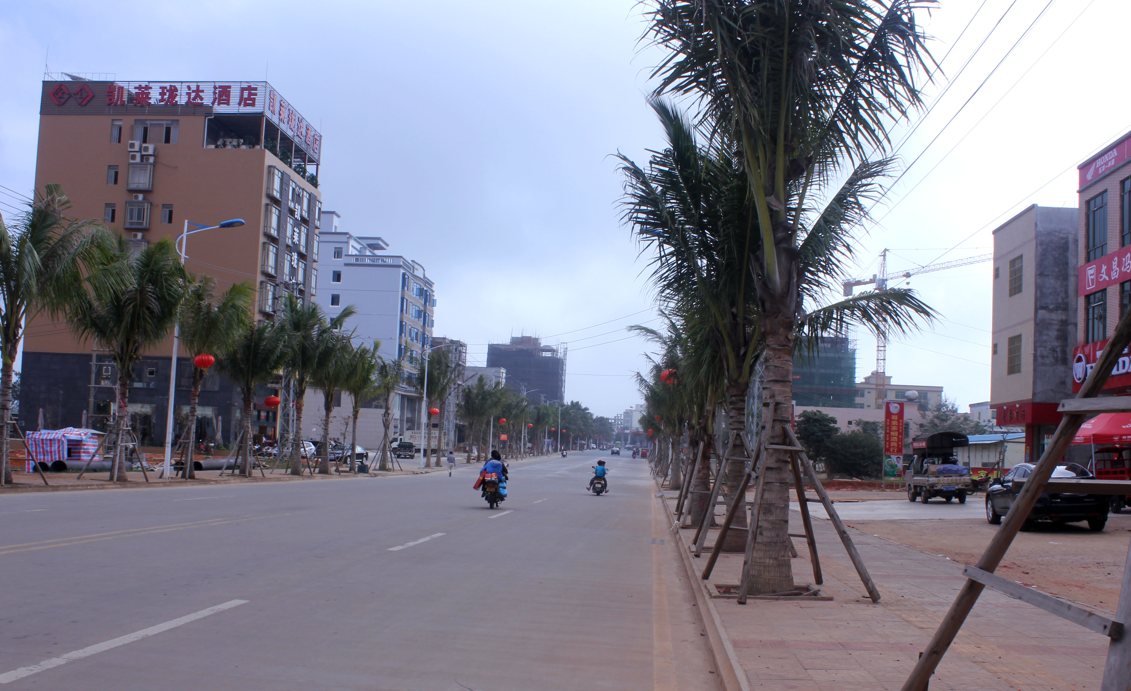 中国海南省文昌市龙楼镇。